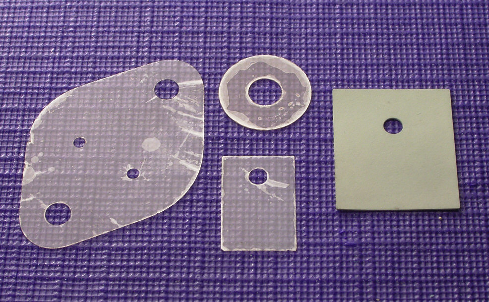 Glimmer- und Silikongummischeiben zur isolierten Montage von Leistungshalbleitern